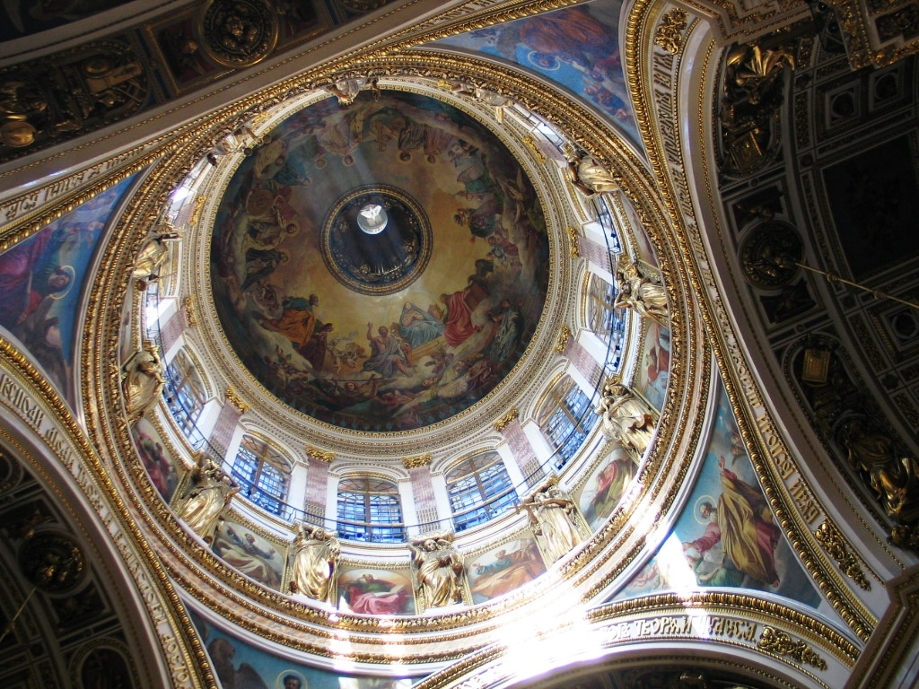 Koepel van de Izaäkkathedraal